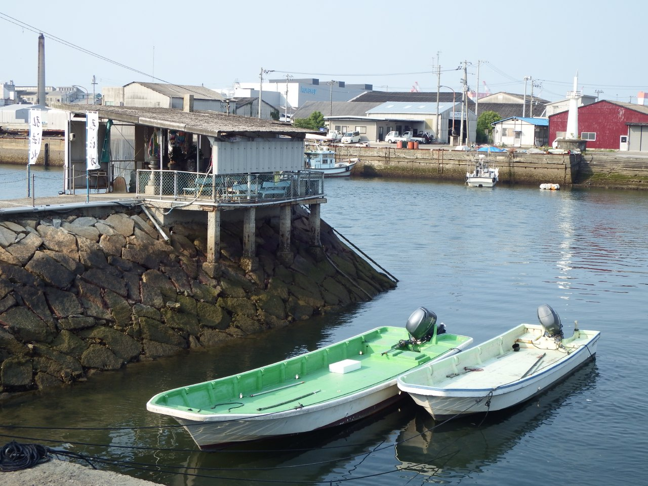 西条市の弘法水